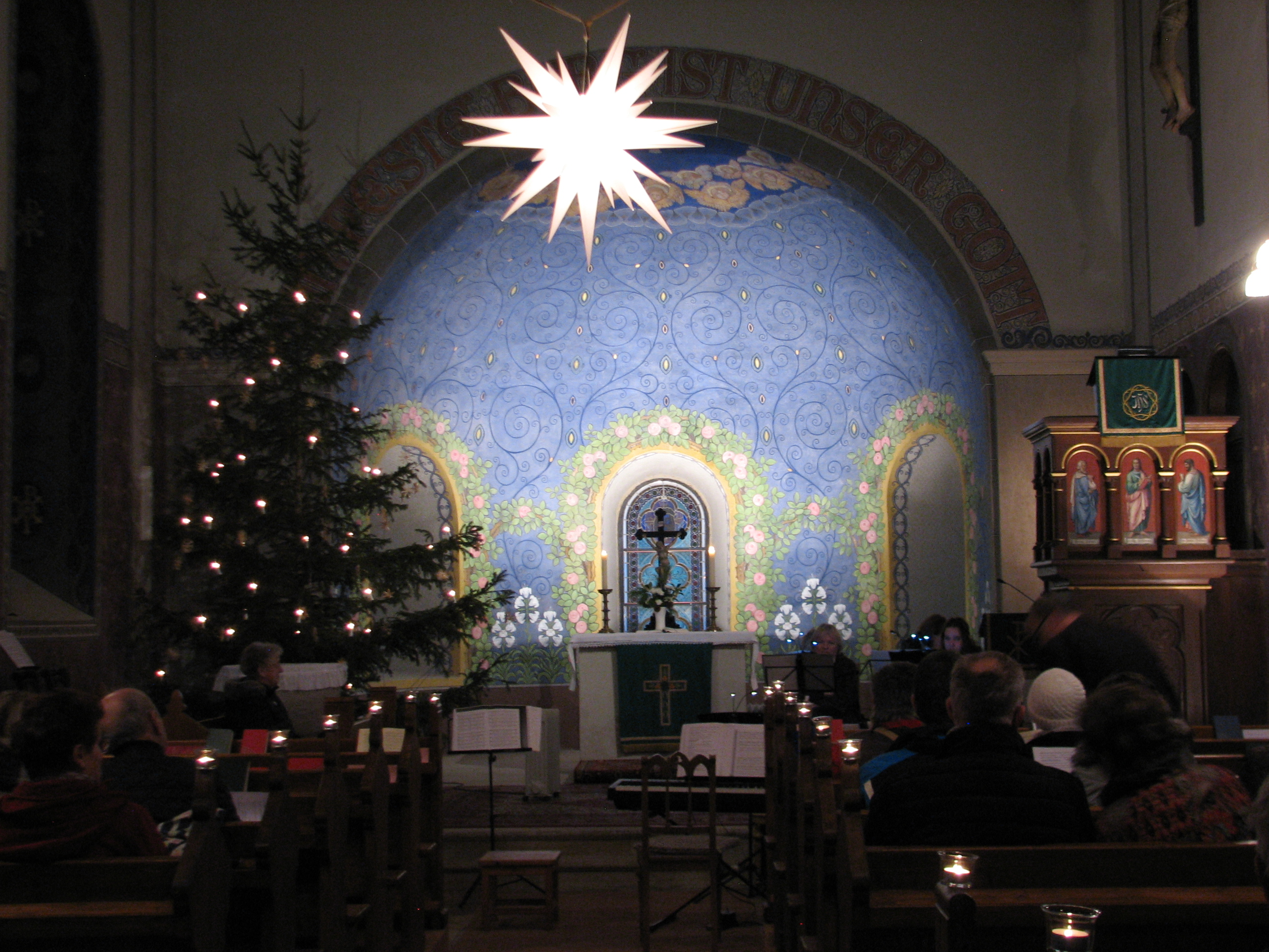 Blick ins Kirchenschiff (zum Ende der Weihnachtszeit zu Maria Lichtmess)